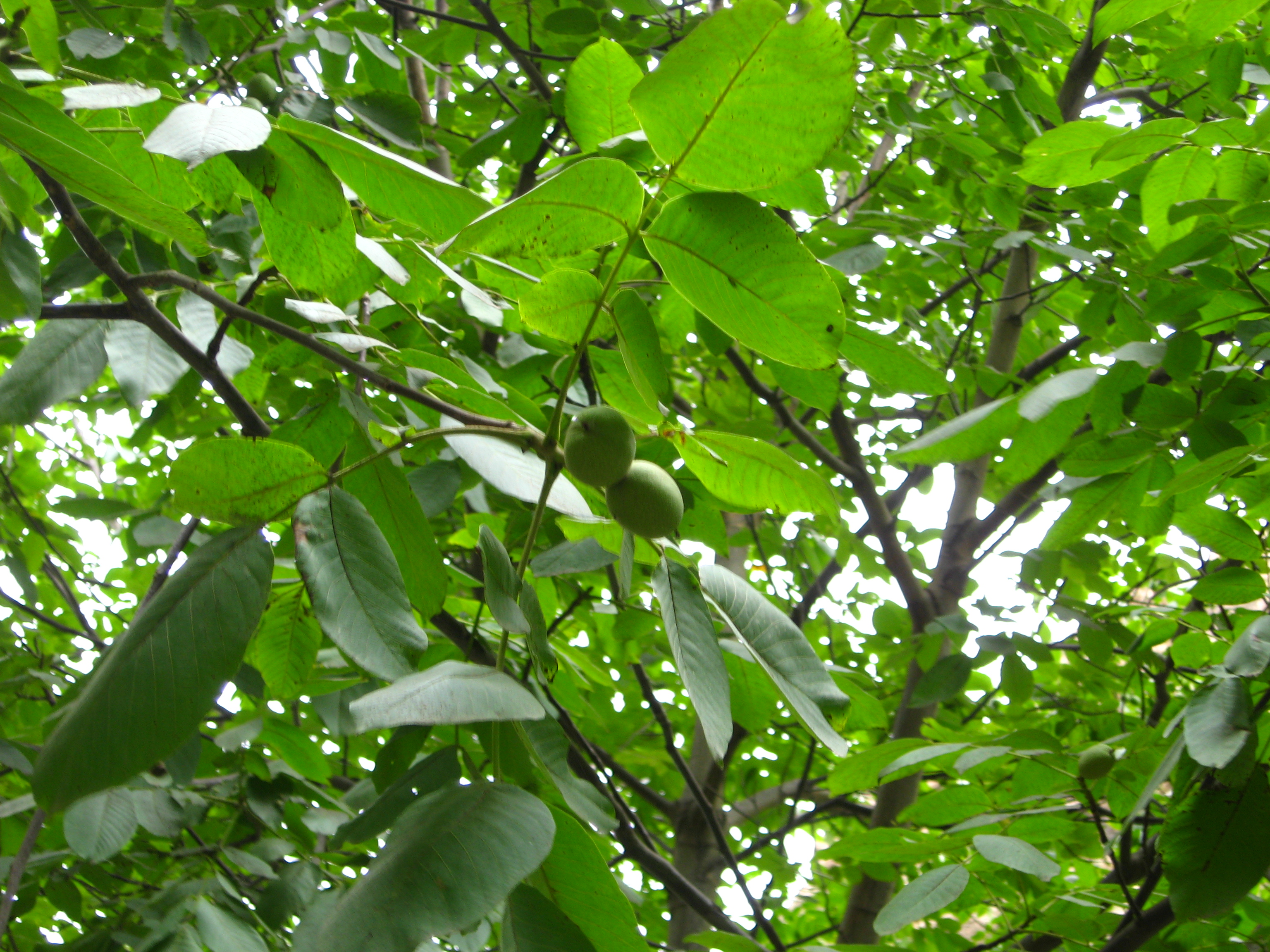 تصویری از درخت گردو به همراه میوه آن.